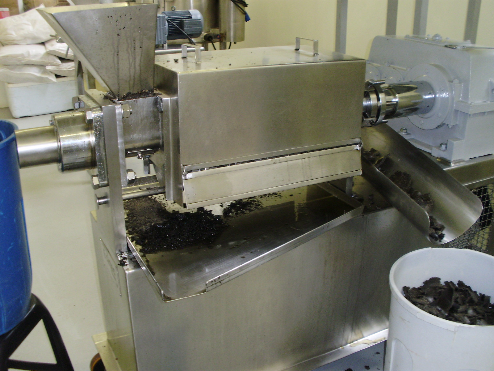 Plantios de girassol em Rio de Janeiro em projeto apoiado pela FAPERJ